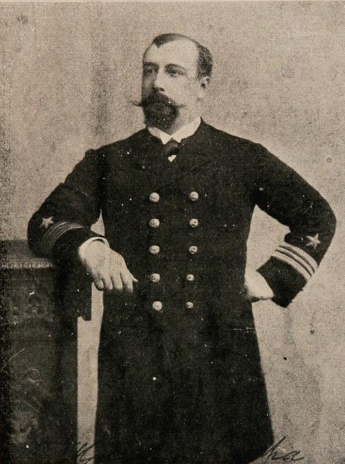 Vicente Merino Jarpa (Linares, 1 de agosto de 1855 - Santiago, 10 de junio de 1901 ) Marino chileno. Participó en la Guerra del Pacífico y en la Guerra Civil de 1891.2